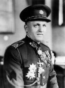 Div. gen. Silvestr Bláha, český voják a odbojář